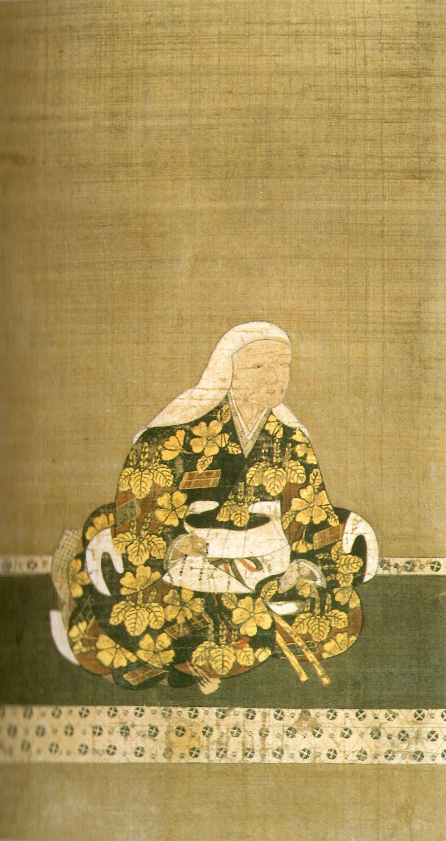 伝通院(於大の方、徳川家康の母)の肖像。